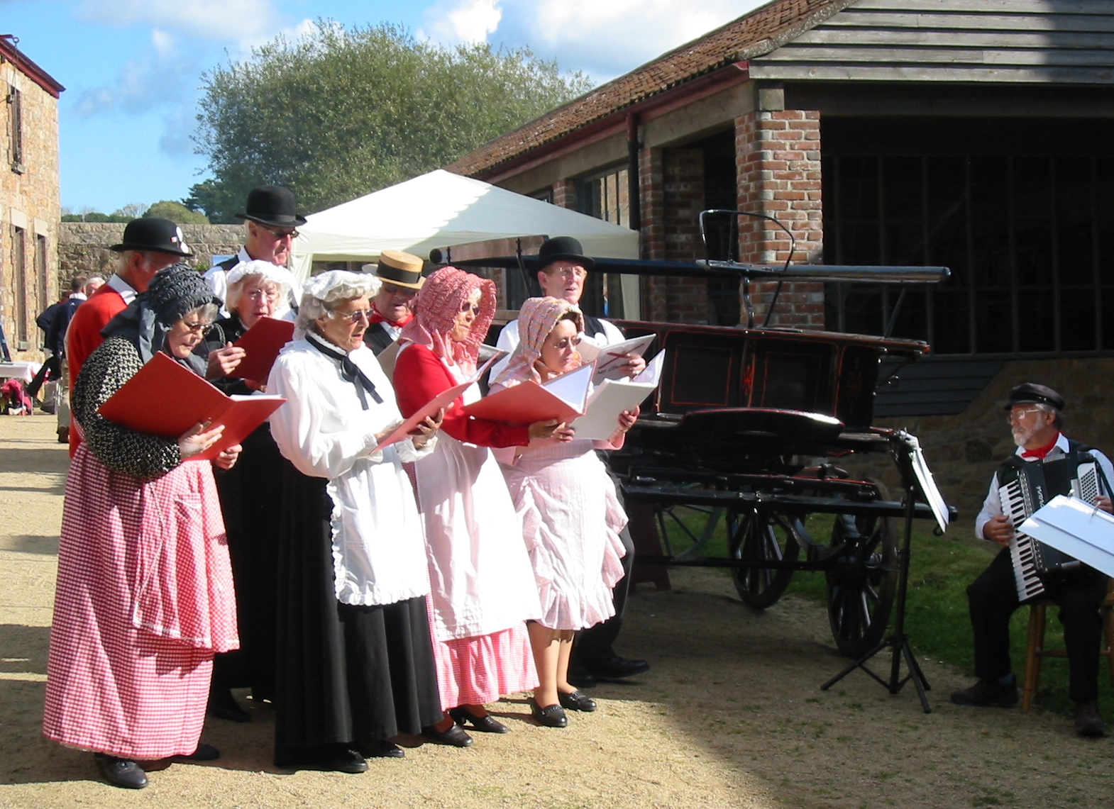 Nrf: Faîs'sie d'Cidre, 18 d'Octobre 2008, Jèrri